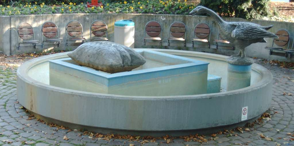 Mannheim-Neckarau Pilwebrunnen. Entwurf: Günther Neinreuther, Bildhauerin: Uta Huber. Einweihung: 1978